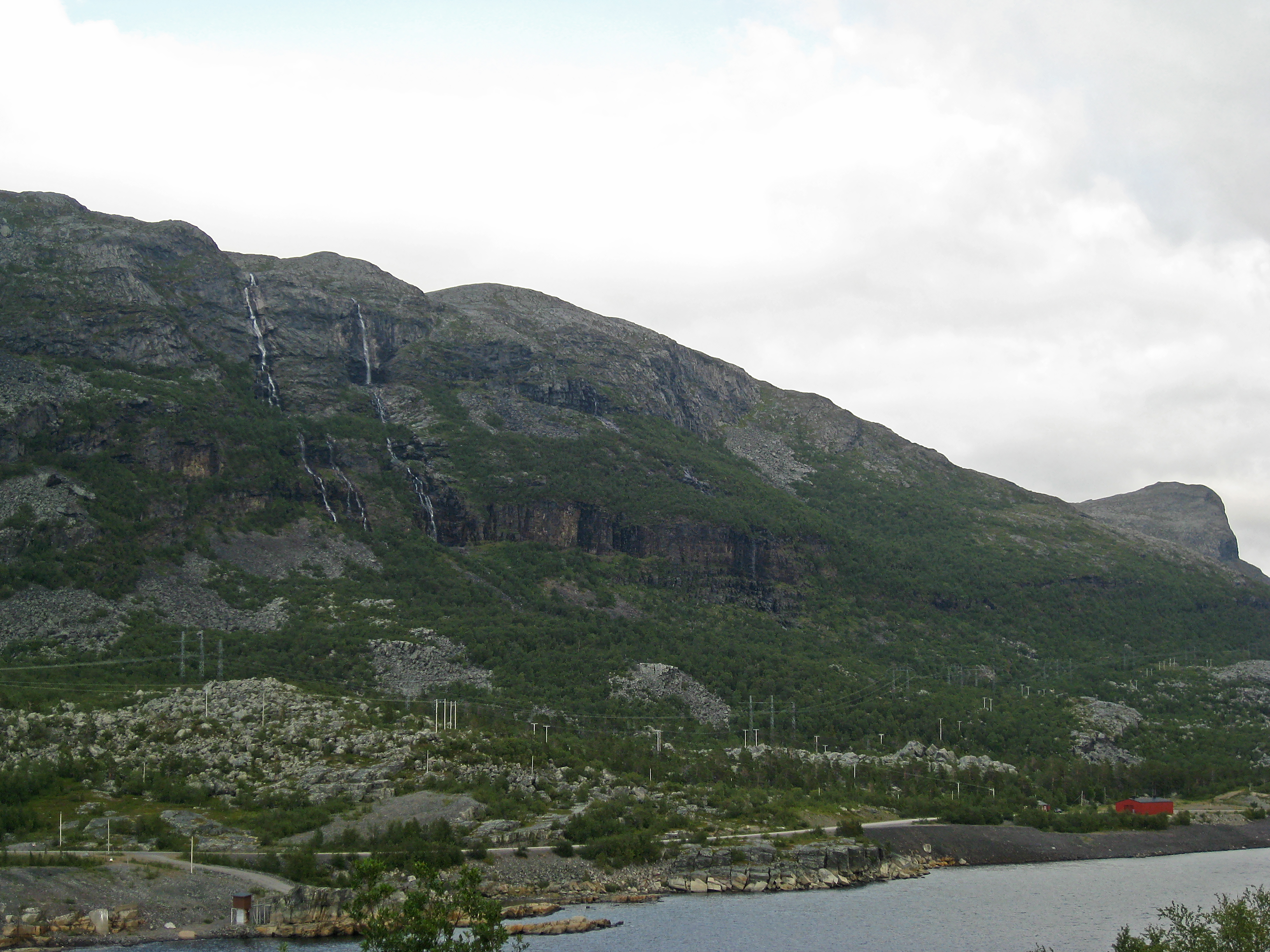 Tvillingfallen vid Suorvadammen, Stora Sjöfallet